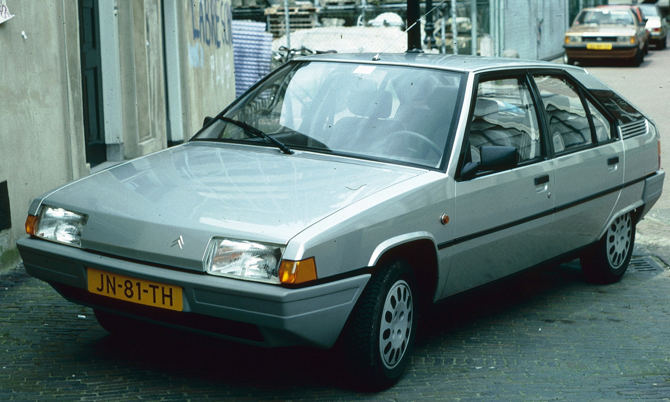 Citroen BX